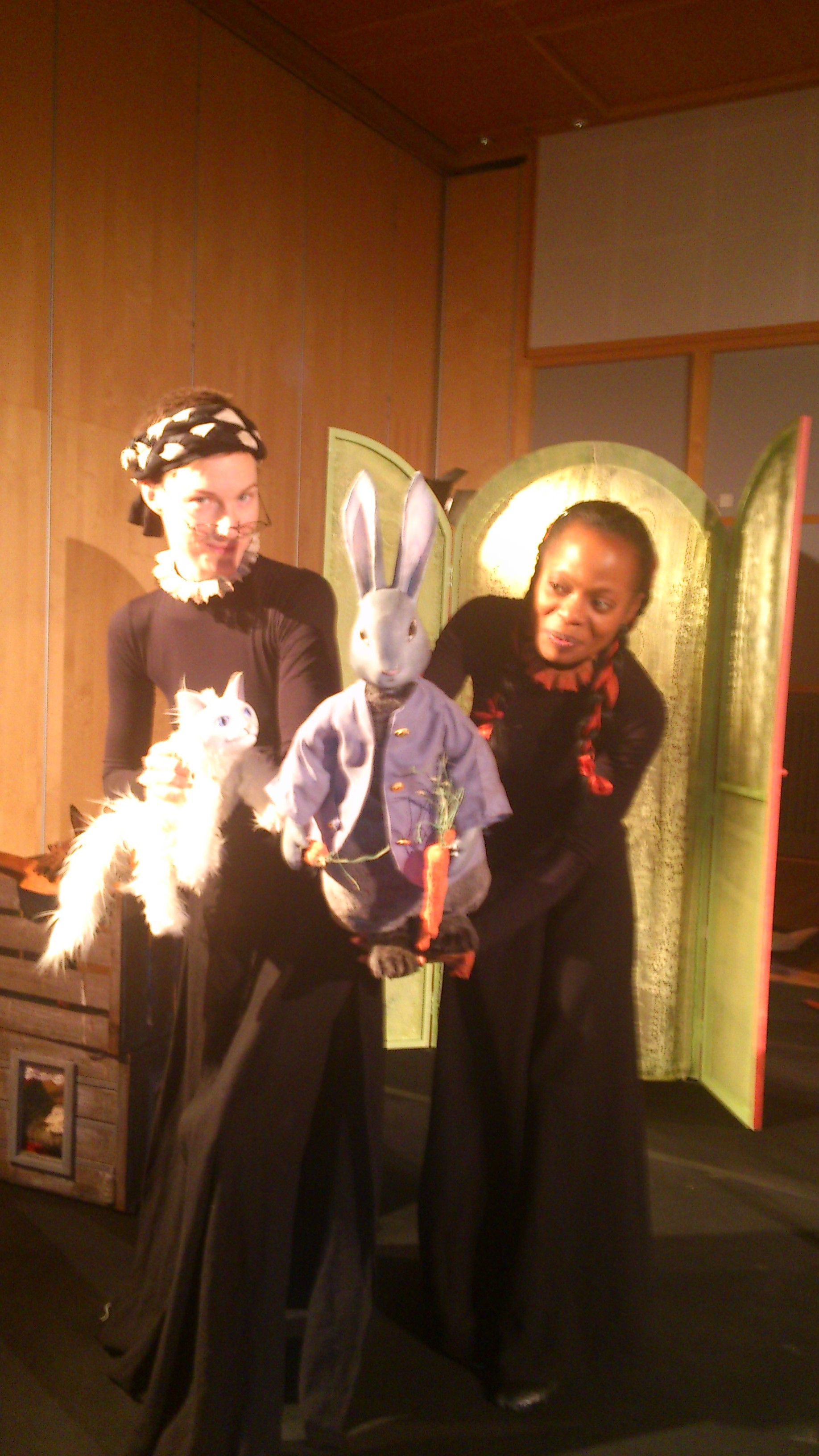 "Beatrix värld" av Dockteatern Tittut, fritt efter Beatrix Potters barnsagor. Dockspelarna Maria Selander och Lisette Merenciana som vuxen och som ung Beatrix Potter. 27 feb 2015, Kulturhuset Fregatten, Stenungsund